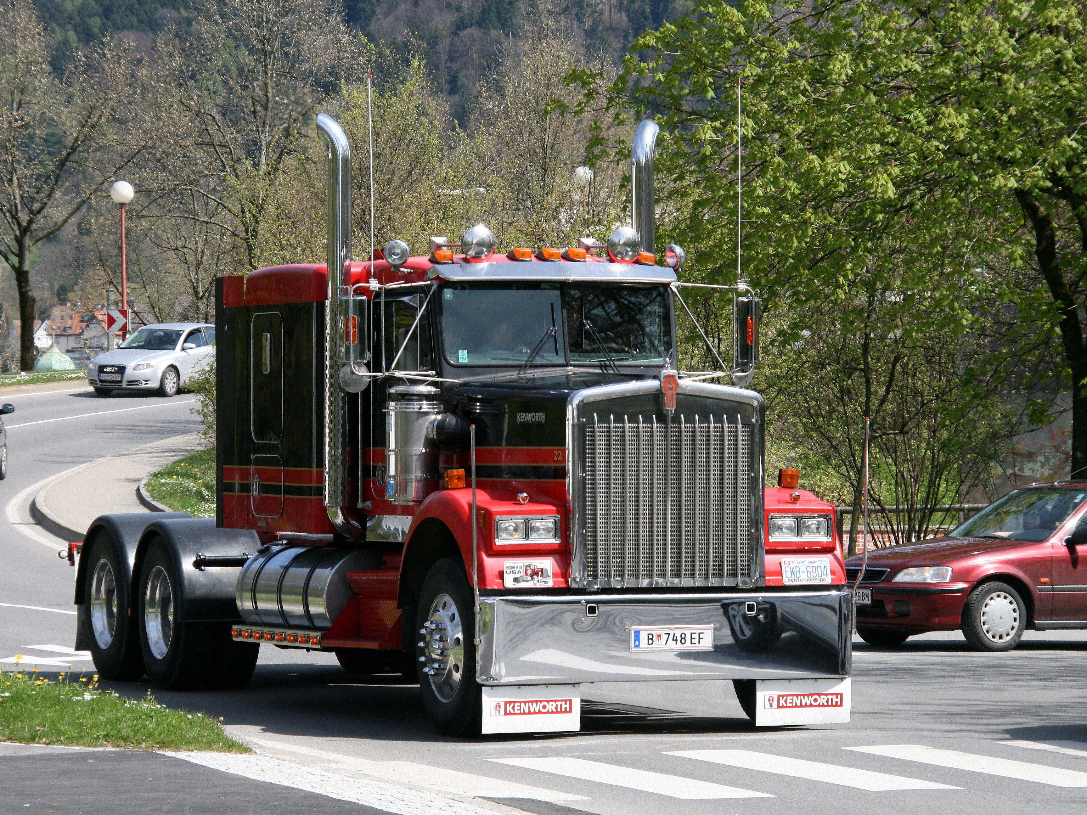 Kenworth W900 gesehen in Bregenz, Vorarlberg.